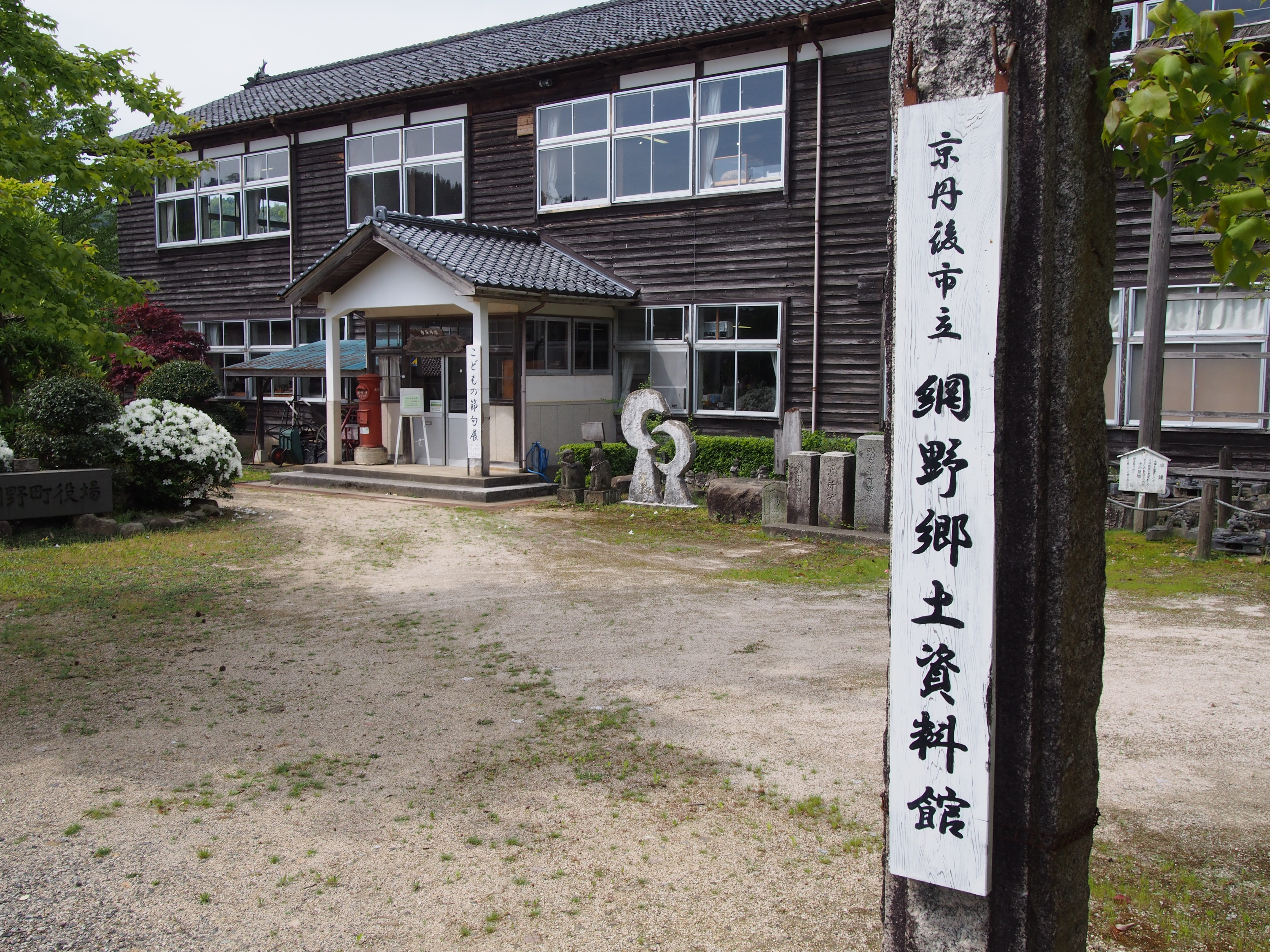 京丹後市立網野郷土資料館(京都府京丹後市網野町木津） この建物としては閉館し、現在は旧京丹後市立郷小学校の校舎を利用して、京丹後市立郷土資料館として再出発した。